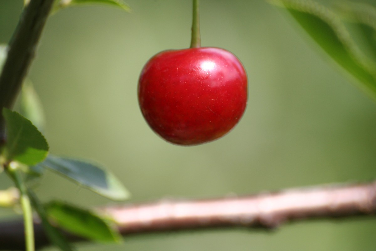 Owoc wiśni.